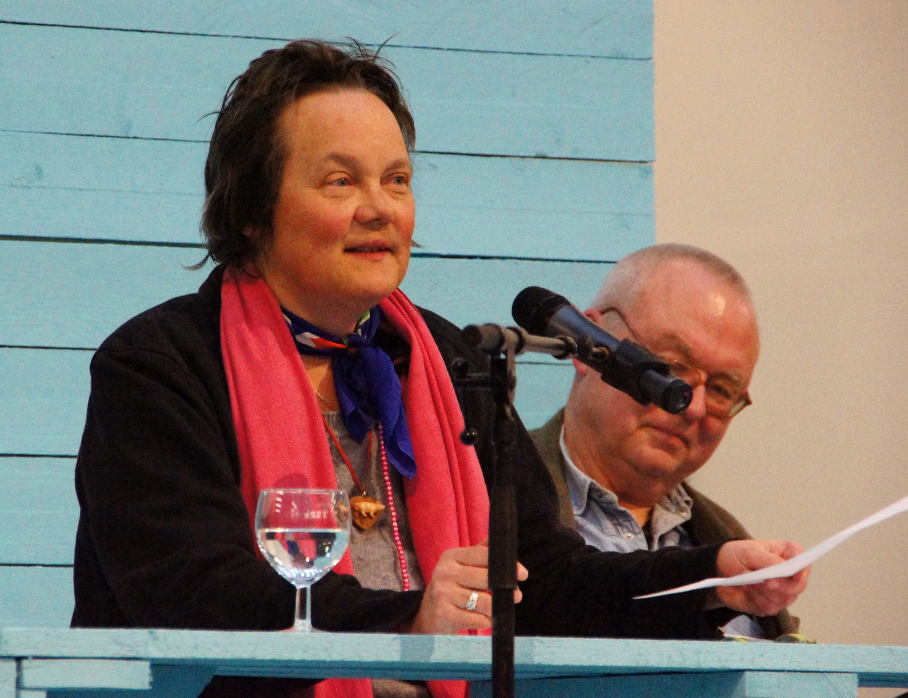 Unter dem Titel "Eine Versammlung kommt selten allein" lasen, anlässlich des 40. Jahrestages der Gründung, Lyriker und Lyrikerinnen der Grazer Autorinnen Autorenversammlung im "Salon für Kunstbuch im 21er Haus". Abgebildete Personen: S. Dateiname.